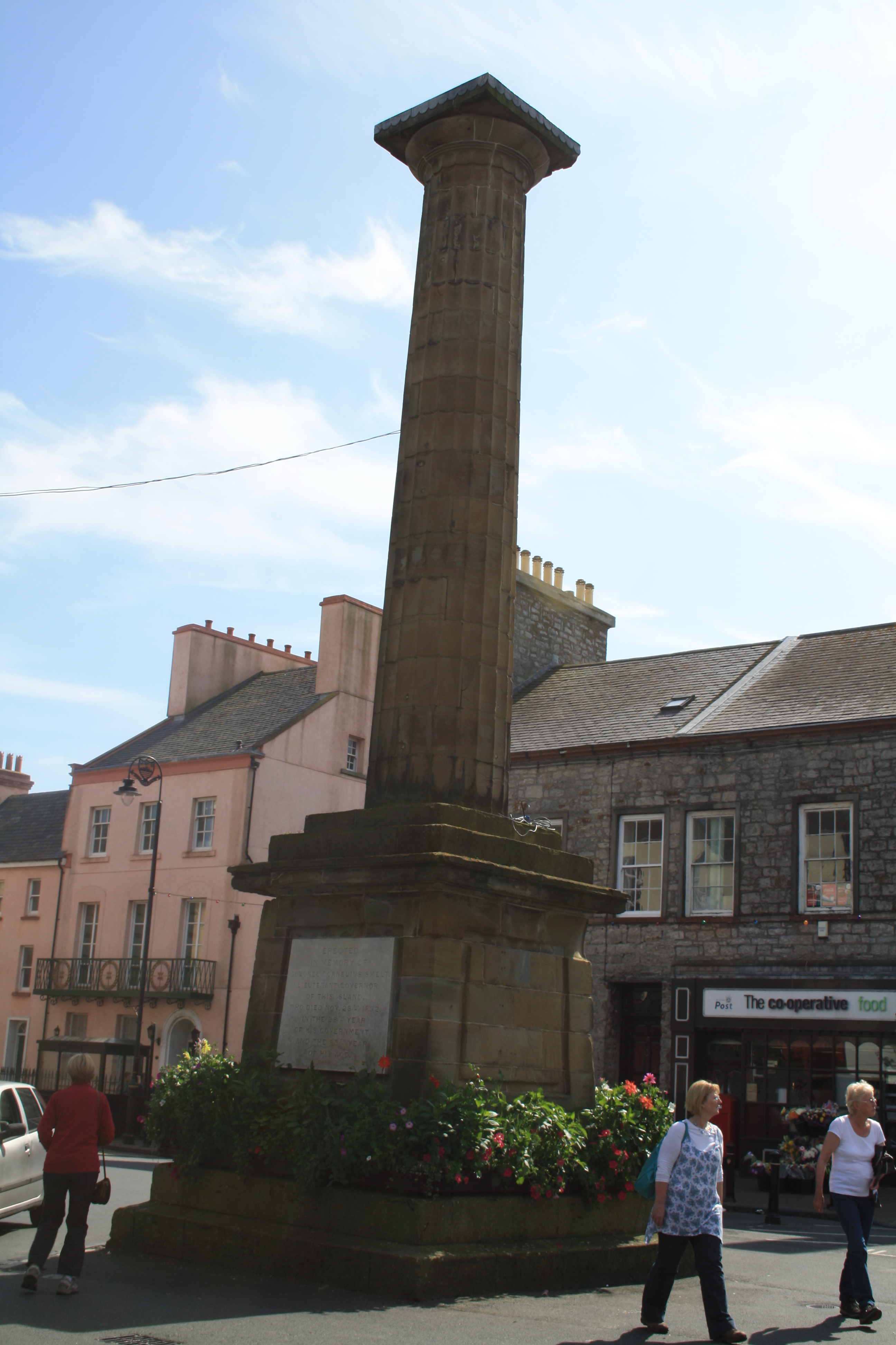 colonna centrale della piazza di Castle Town. Incisione presente, che dice "Erected in memory of Colonel Cornelius Smelt. Lieutenant Governor of this Island. Who died November 28th 1862. In the 28th year of his government. And the 85th year of his age."